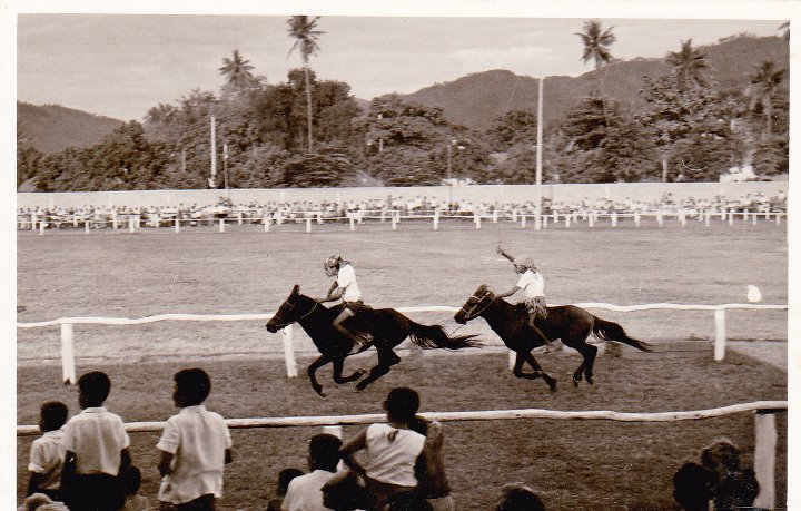 Corrida de cavalos típica de Timor,em que os cavaleiros montavam "em pêlo",isto é, sem sela ou arreio mas apenas com uma cabeçada